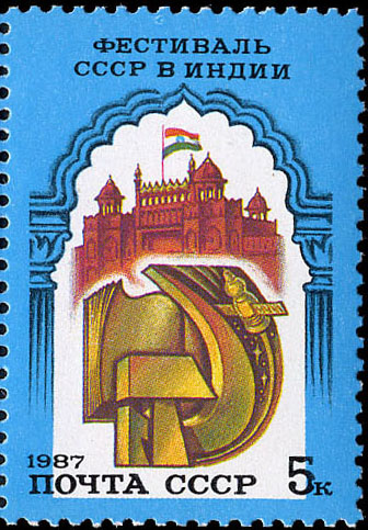 Почтовая марка советско-индийского фестиваля